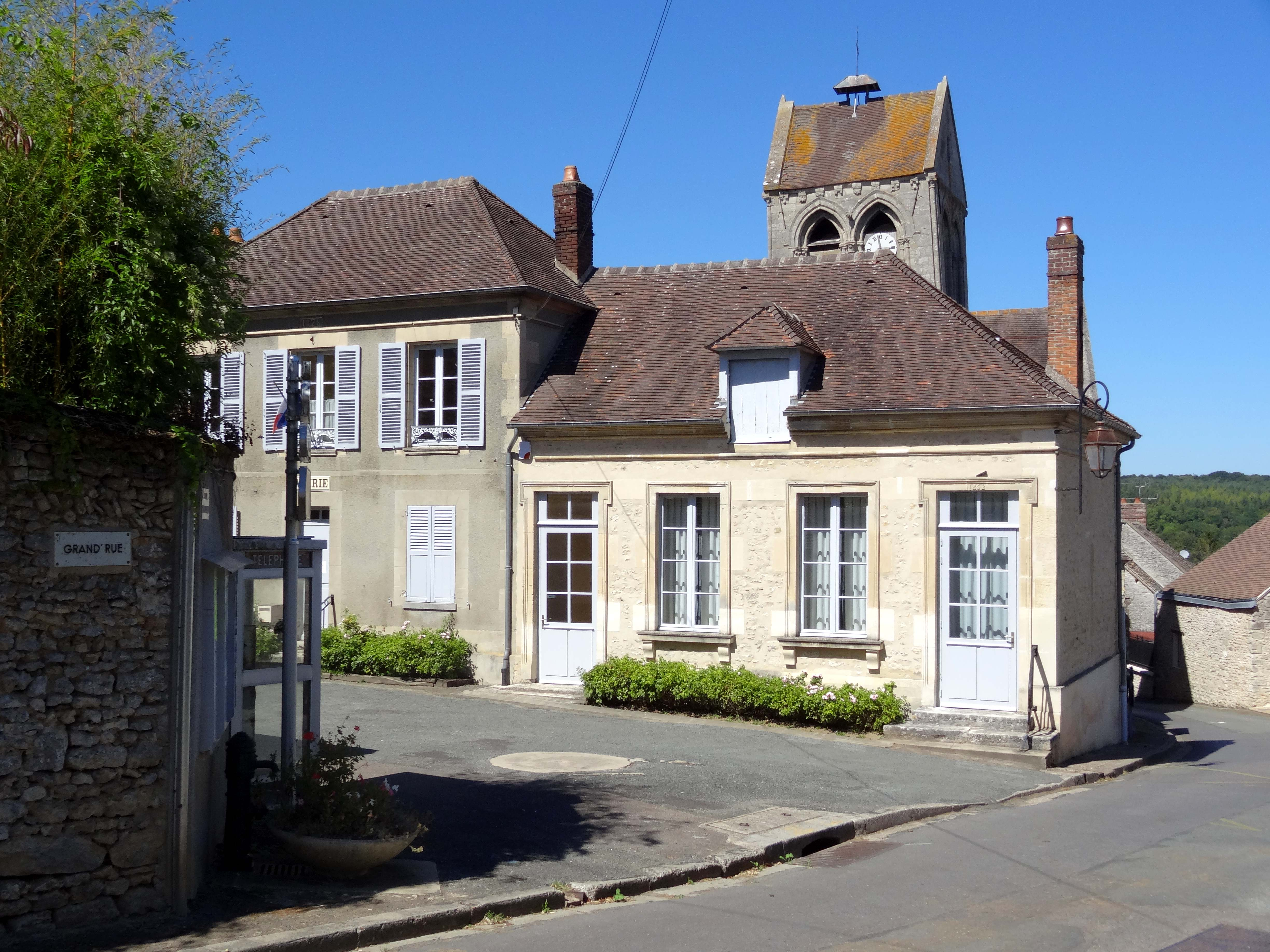 Vaudancourt - voir titre.